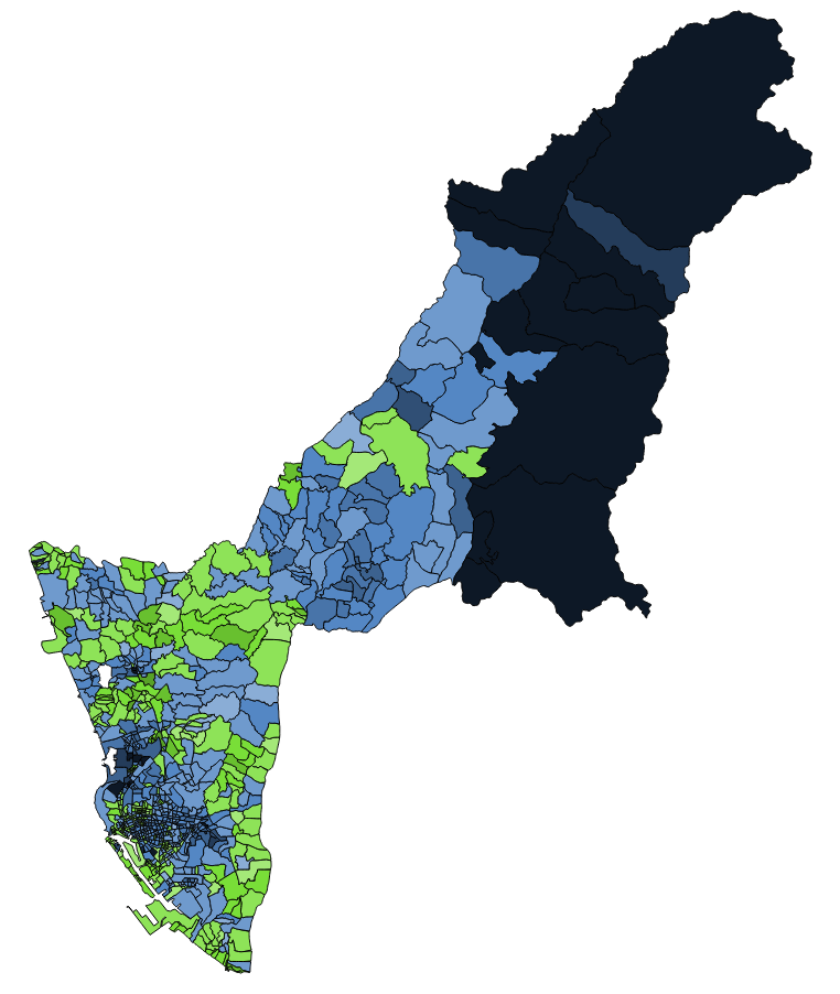 2018 高雄市市長選舉各里得票